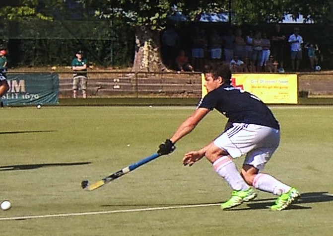 Der Hockeynationalspieler Pelt Arnold im Trikot von TC Blau-Weiss Berlin beim Auswärtsspiel gegen TG Frankenthal am 11. September 2016